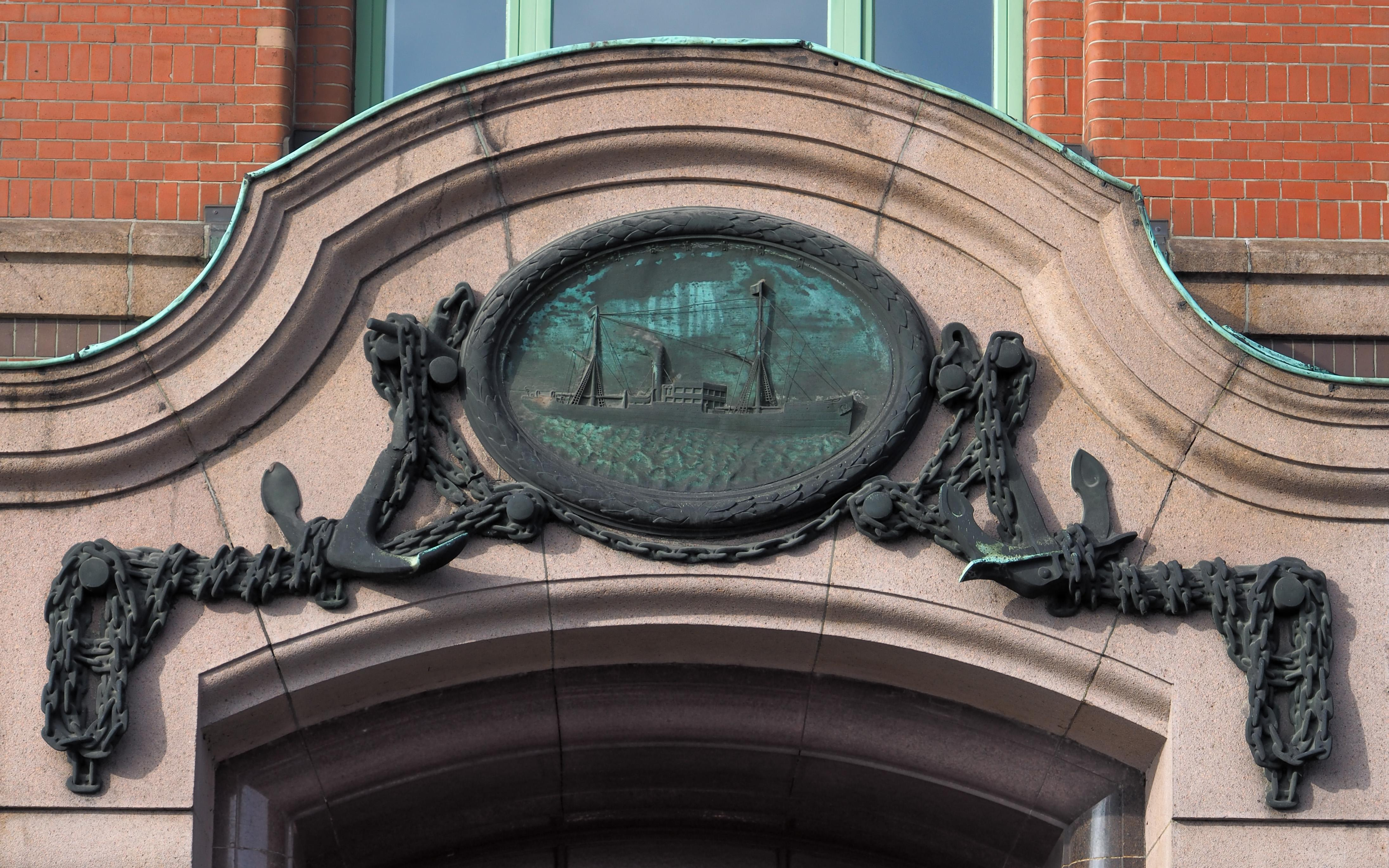 Hamburg, Slomanhaus, Detail über dem Eingang